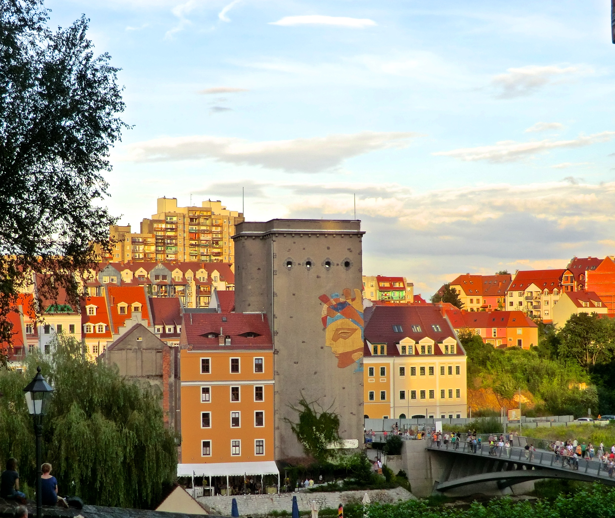 Altstadtbrücke und Dreiradenmühle Zgorzelec / Görlitz